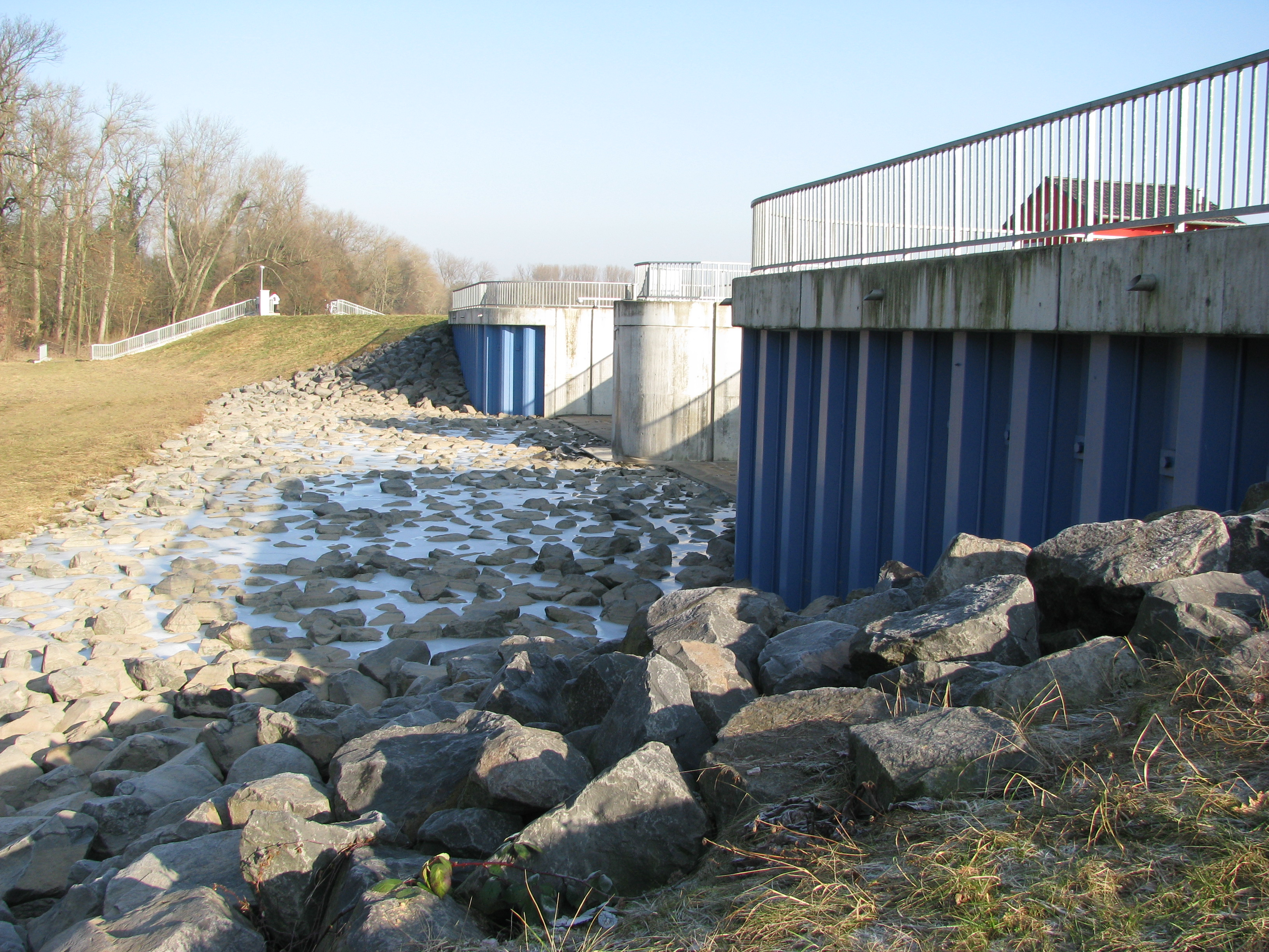 Polder bei Ingelheim, Durchlassbauwerk, Steinschüttung an der Flusseite